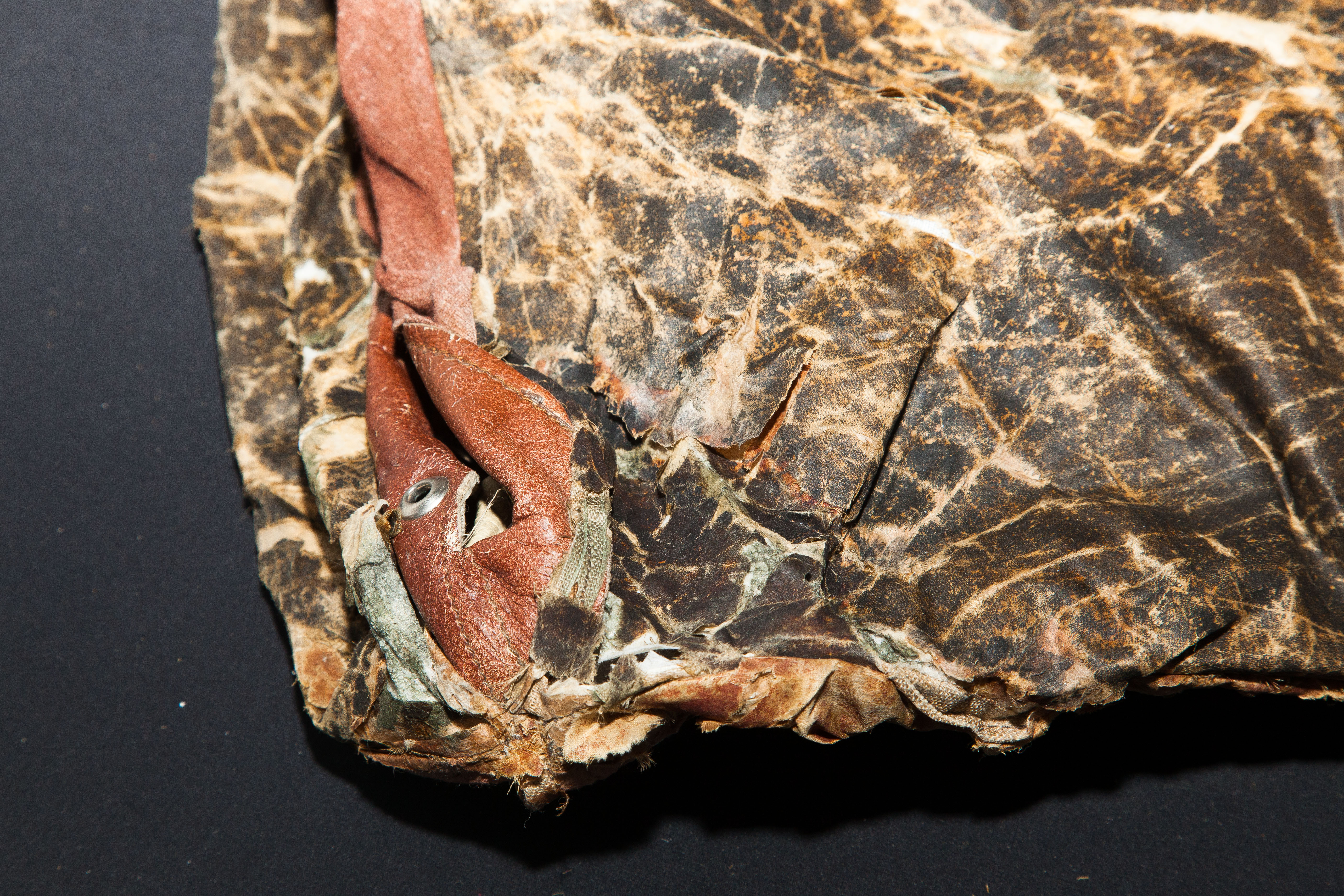 Ad Astra: Detail der Hülle des Ballons von 1784. Die Hülle befindet sich heute im Städtischen Museum Braunschweig (SMBS)